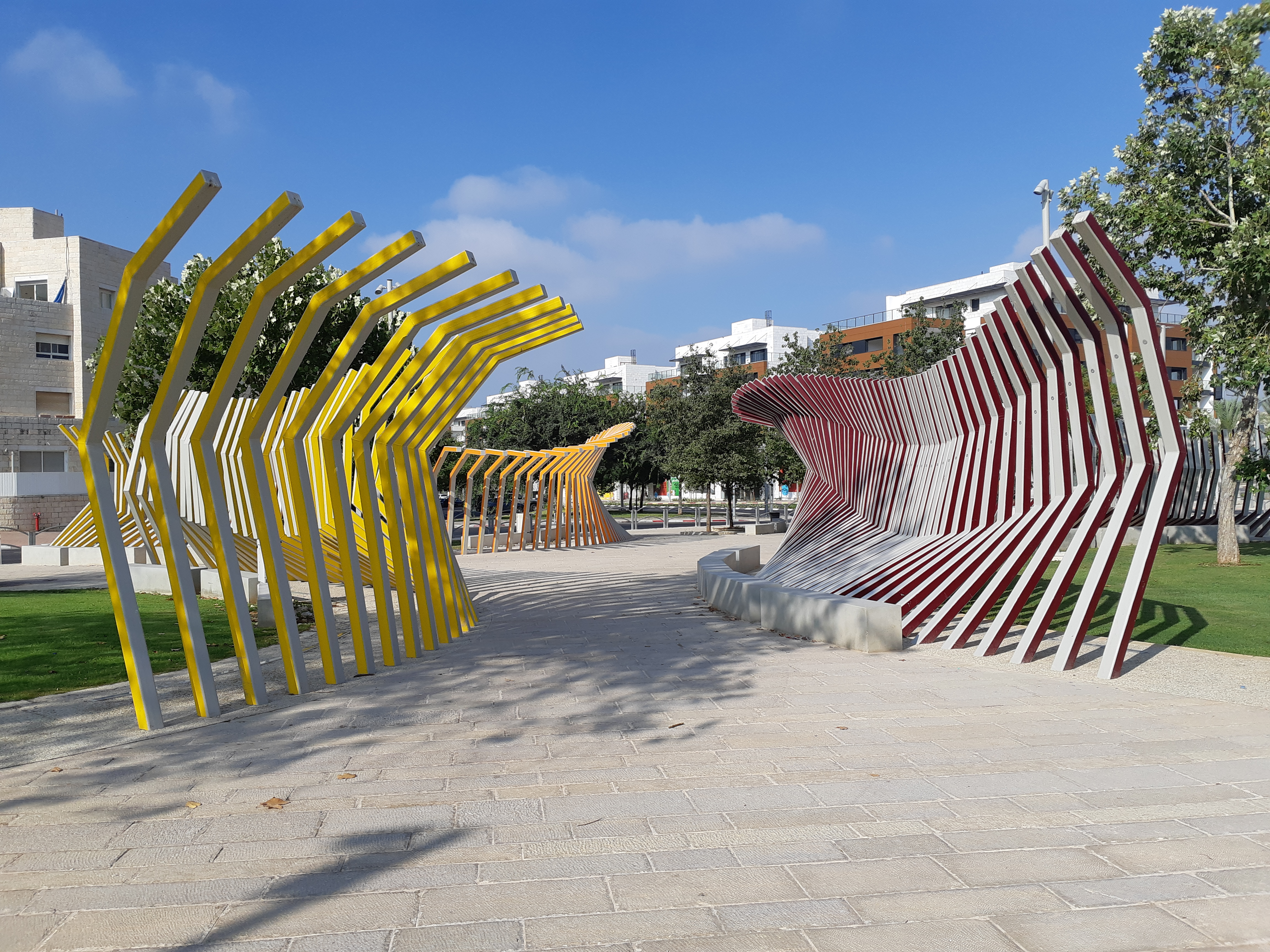 פסל סביבתי בקצה המערבי של הרחוב עמק האיילון